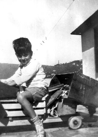 Yin-Yin, Juan Miguel Godoy Mendoza sobrino de Gabriela Mistral, hacia 1930.